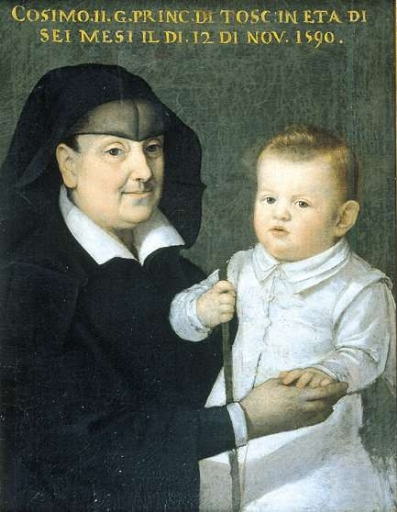 Cosimo II de' Medici (1590-1621) all'età di sei mesi con la governante Costanza della Gherardesca, 1590